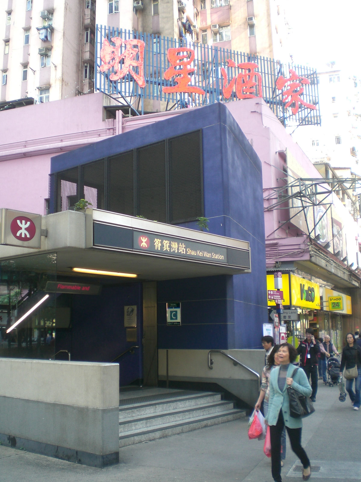 筲箕灣望隆街, Mong Lung Street, Shau Kei Wan, Hong Kong